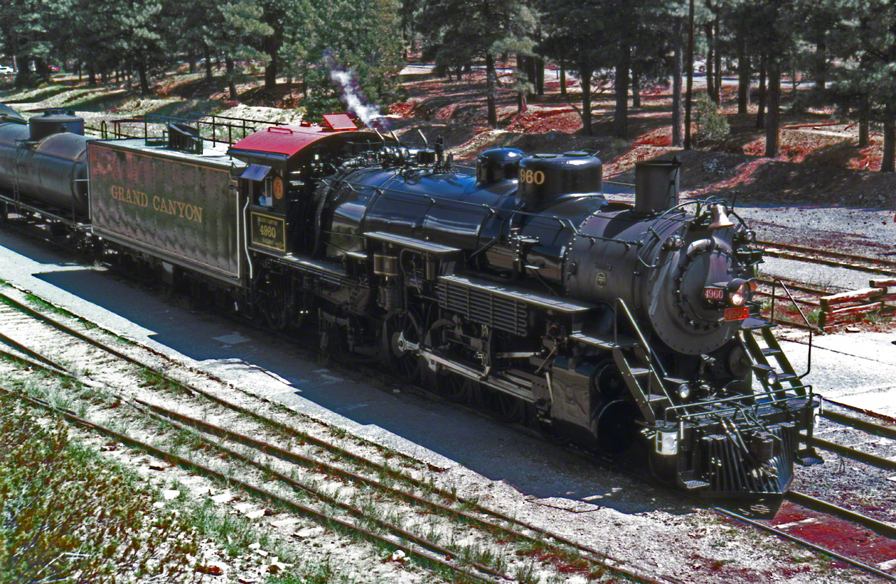 グランド・キャニオン鉄道 ─現在でも再生植物油で走り続けている、蒸気機関車No.4960